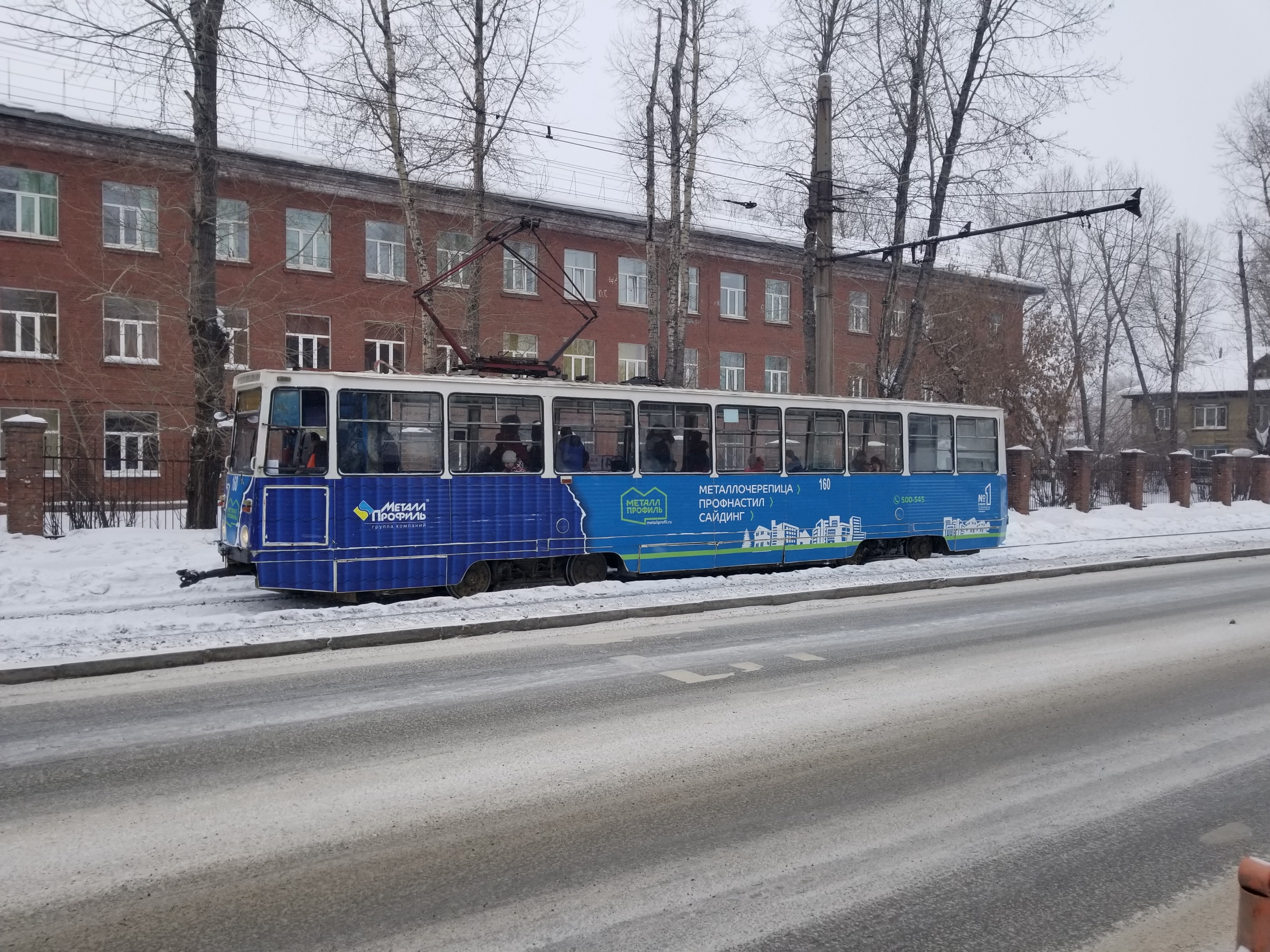 Трамвай № 4 в Иркутске на Напольной улице (январь 2018)